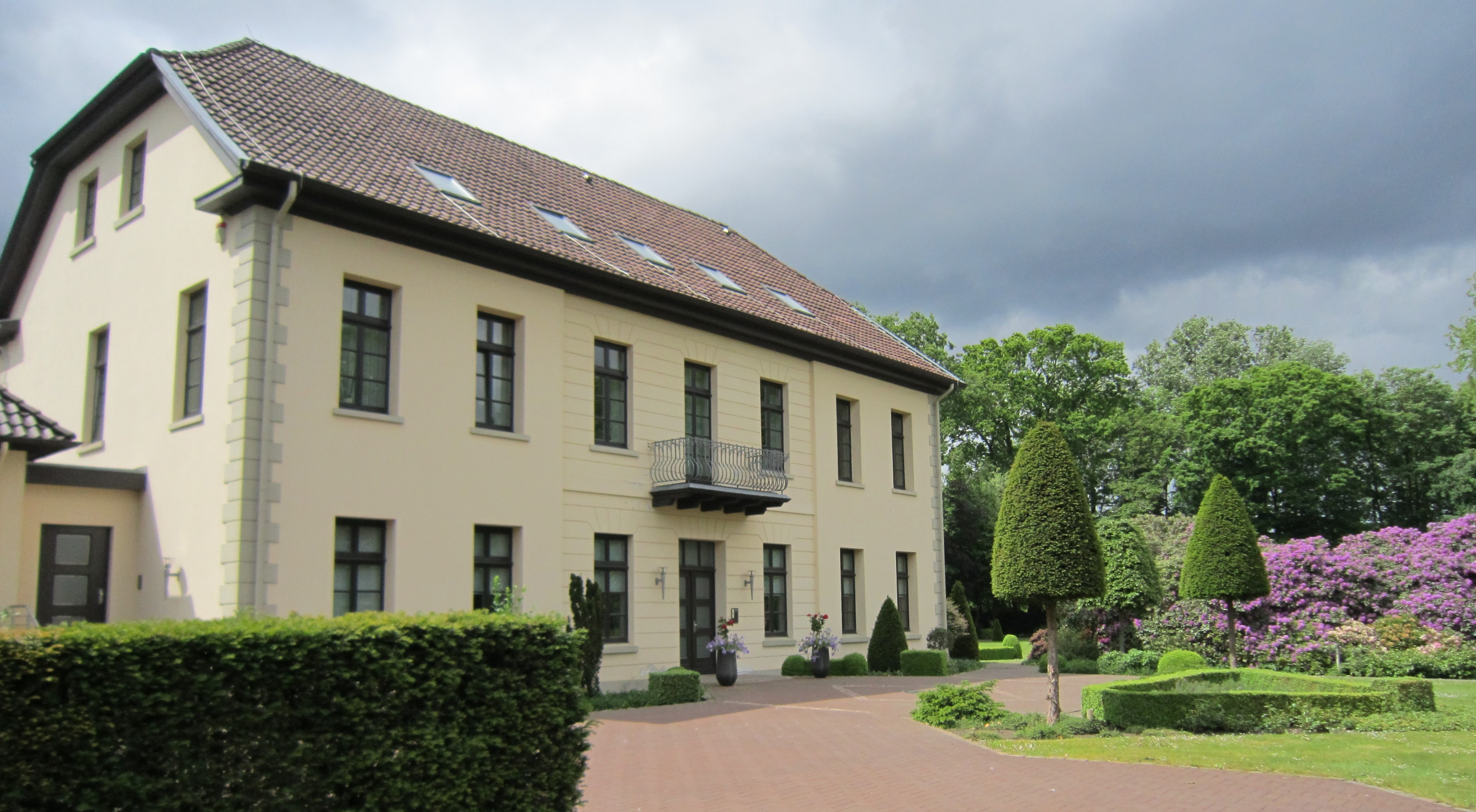 Vechta ist der Sitz des niedersächsischen Teils des katholischen Bistums Münster, der Offizialatsbezirk Vechta genannt wird und mit dem ehemaligen Land Oldenburg weitgehend flächengleich ist. Der Offizial im Rang eines Weihbischofs residiert in dem abgebildeten Gebäude an der Bahnhofstraße in Vechta.